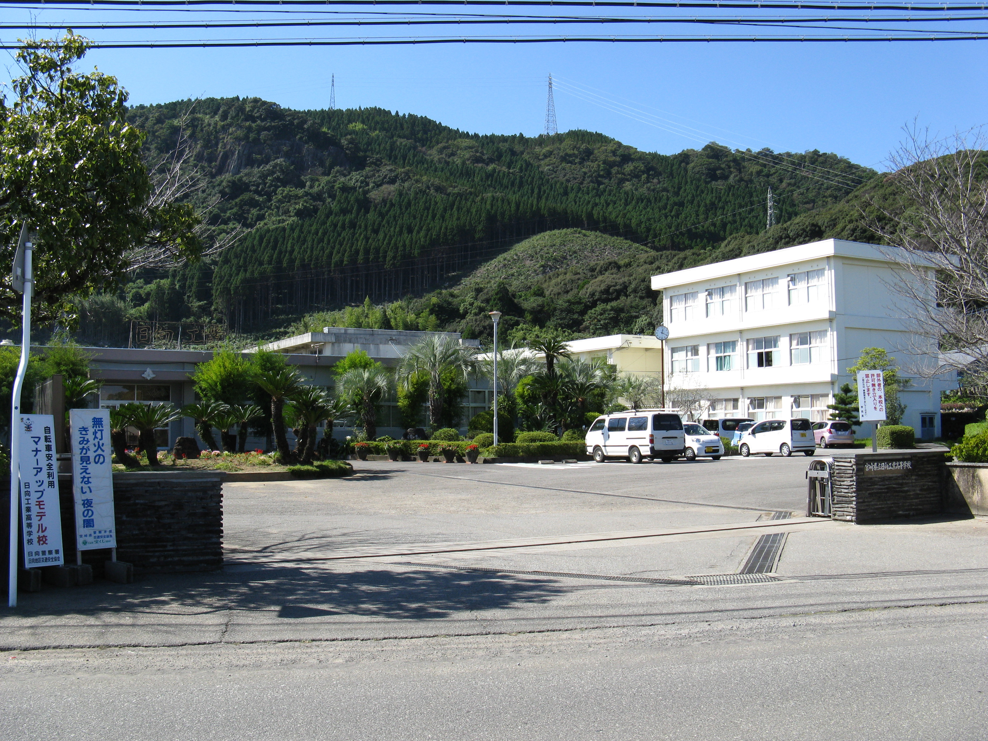 日向工業高等学校、宮崎県日向市